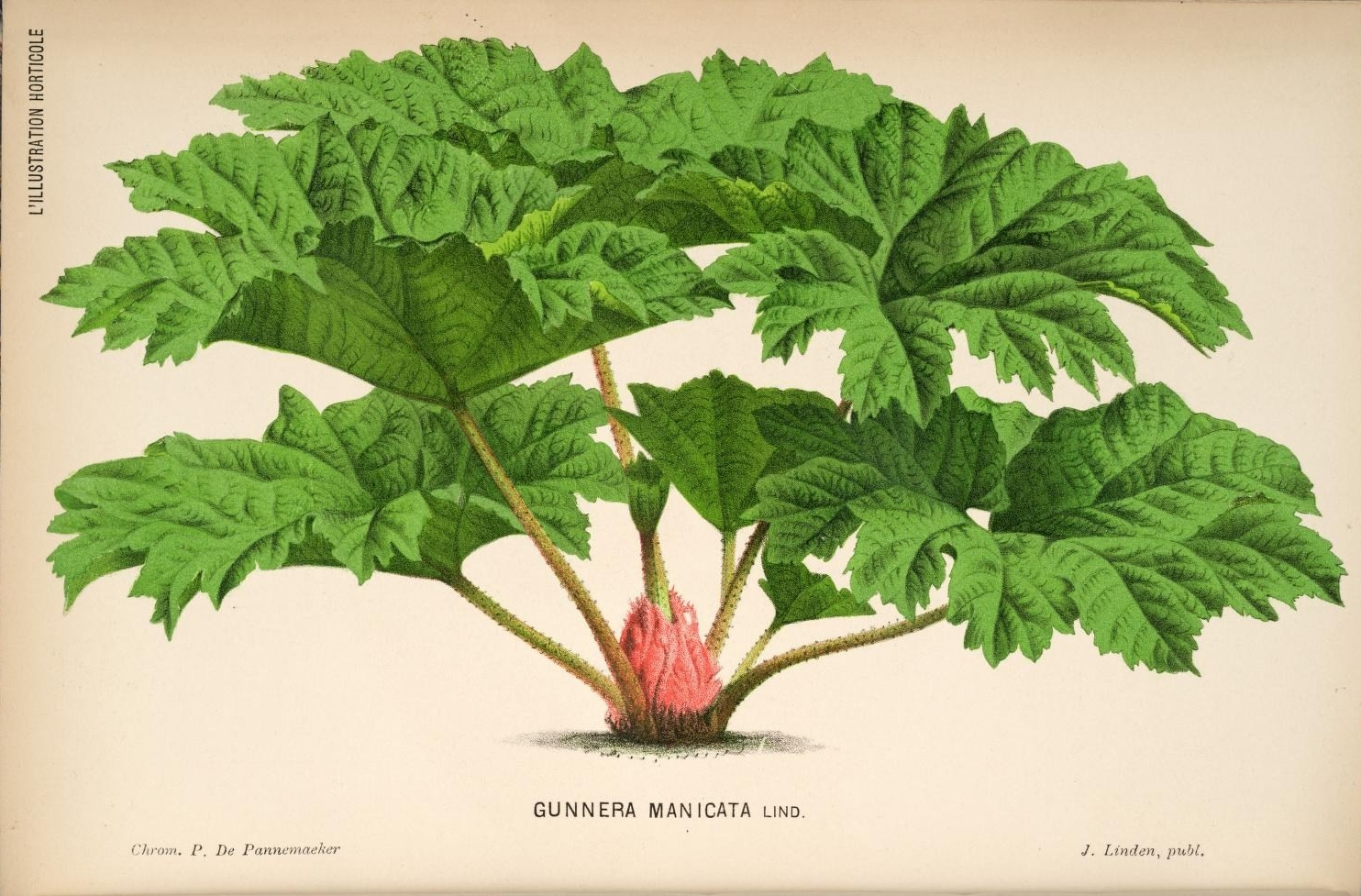 GUNNERA MANiCATA lind Pannemaeker J. Linden^ pubL V